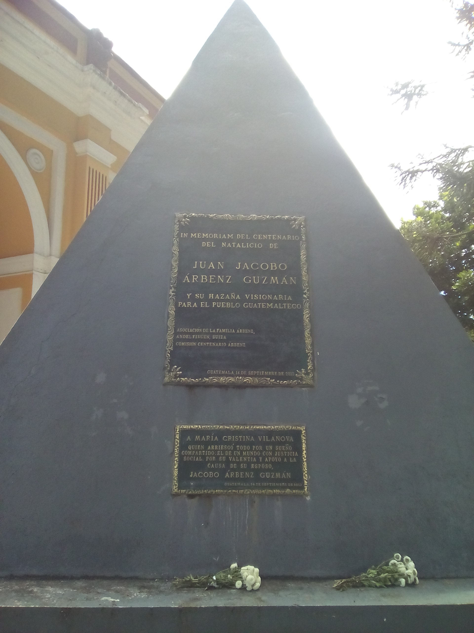 Tumba Arbenz Vilanova